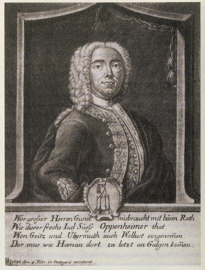 Spottporträt des Joseph Süß Oppenheimer mit dem eisernen Galgen als Emblem. Inschrift: Wer grosser Herren Gunst misbraucht mit bösen Rath Wie dieser freche Jud Süss Oppenheimer that, Wen Geitz und Übermuth, auch Wollust eingenommen, Der mus wie Haman dort zu letzt an Galgen kommen